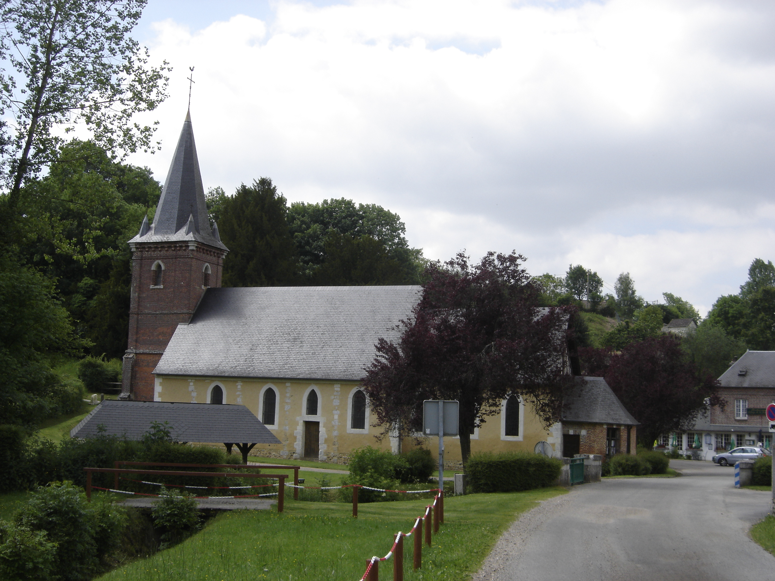 église de Saint-Siméon (Eure - France)